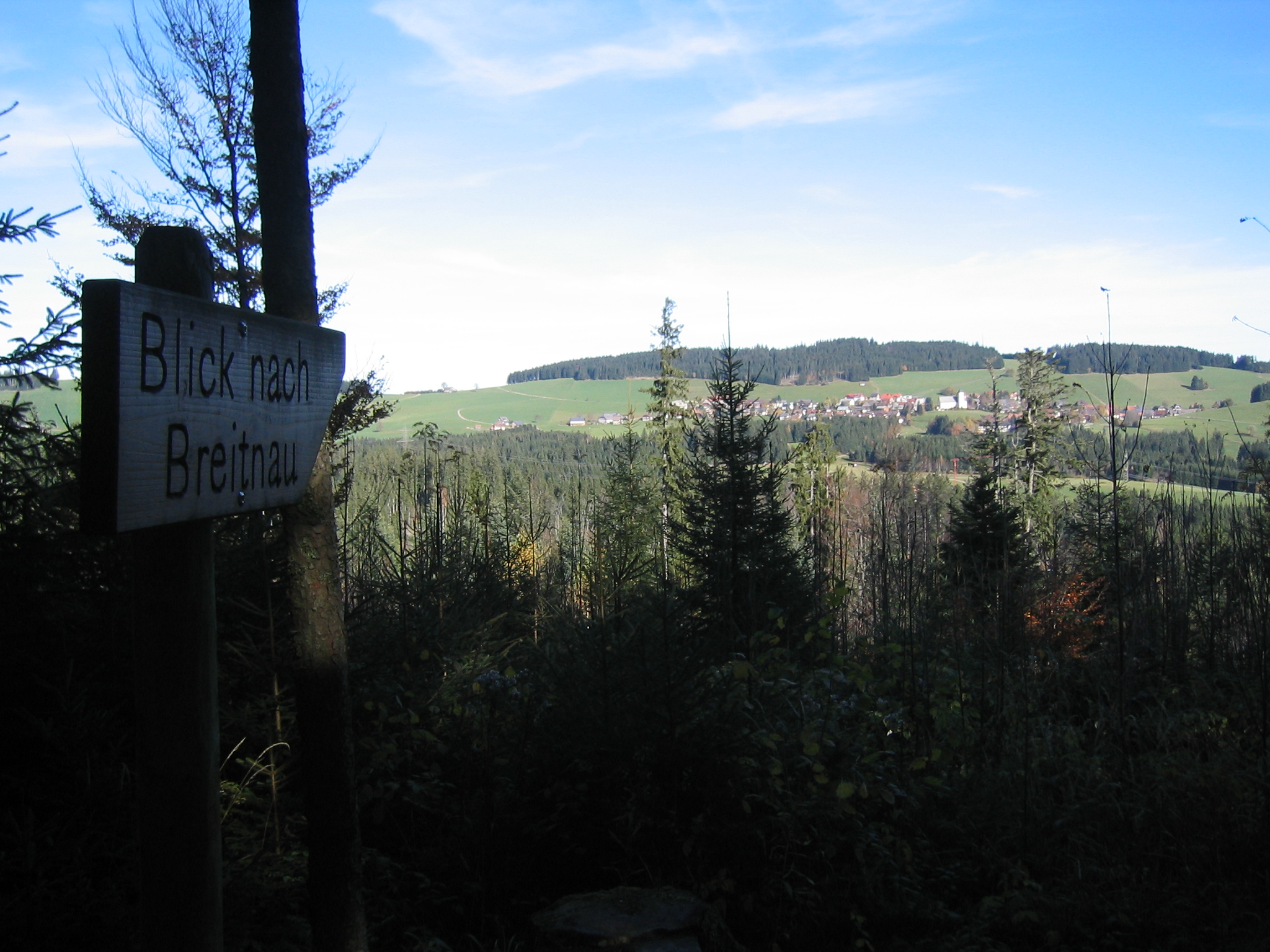 Breitnau. Blick vom Piketfelsen.